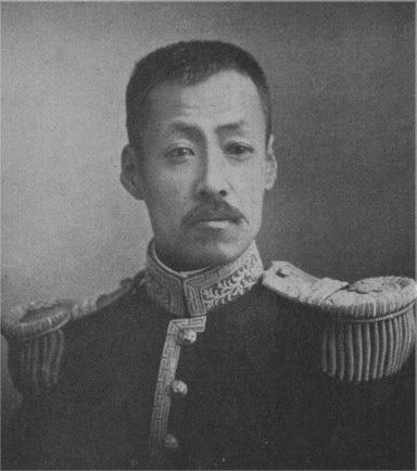 二条正麿男爵